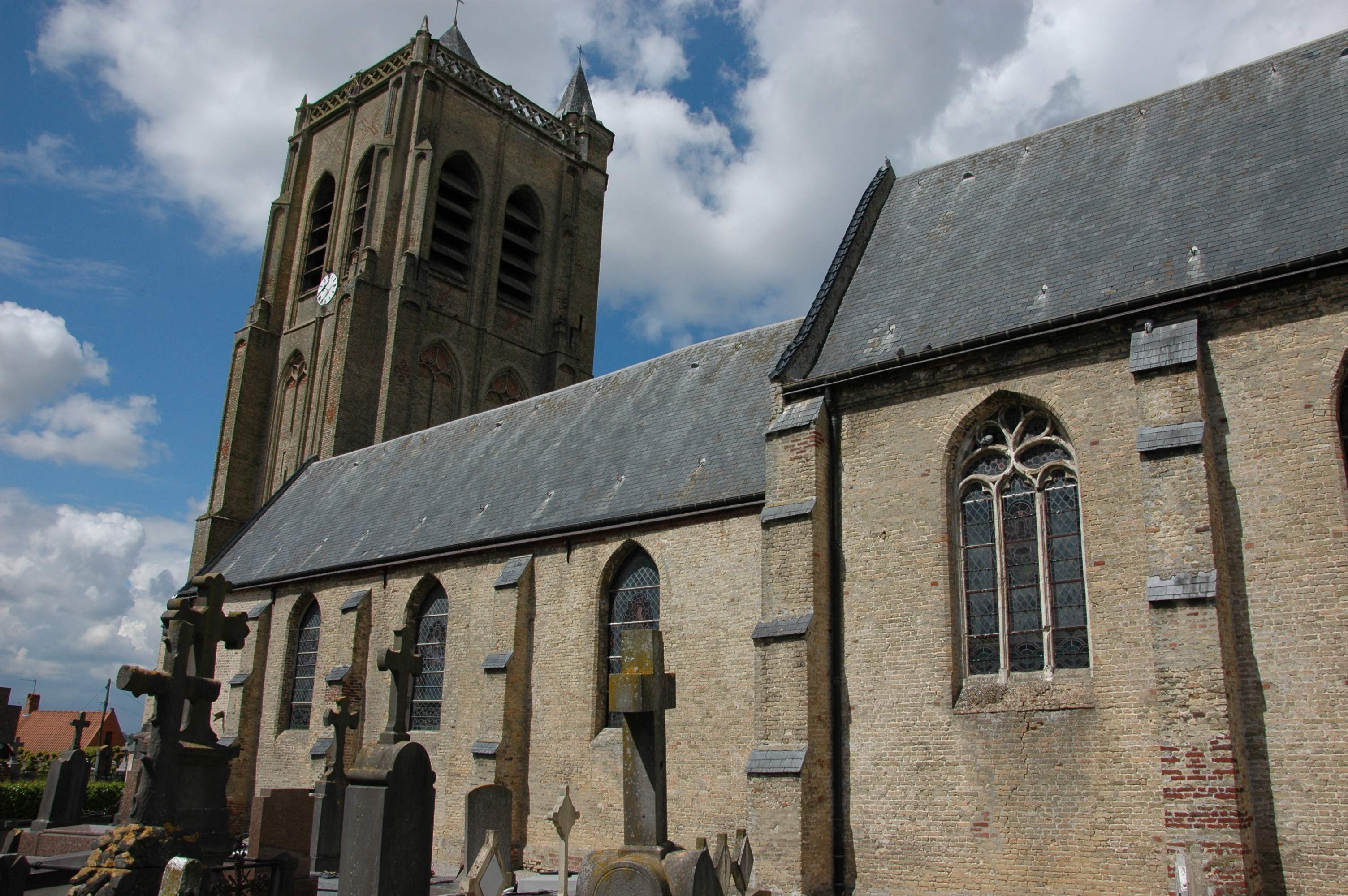 Eglise Saint-Sylvestre à Rubrouck